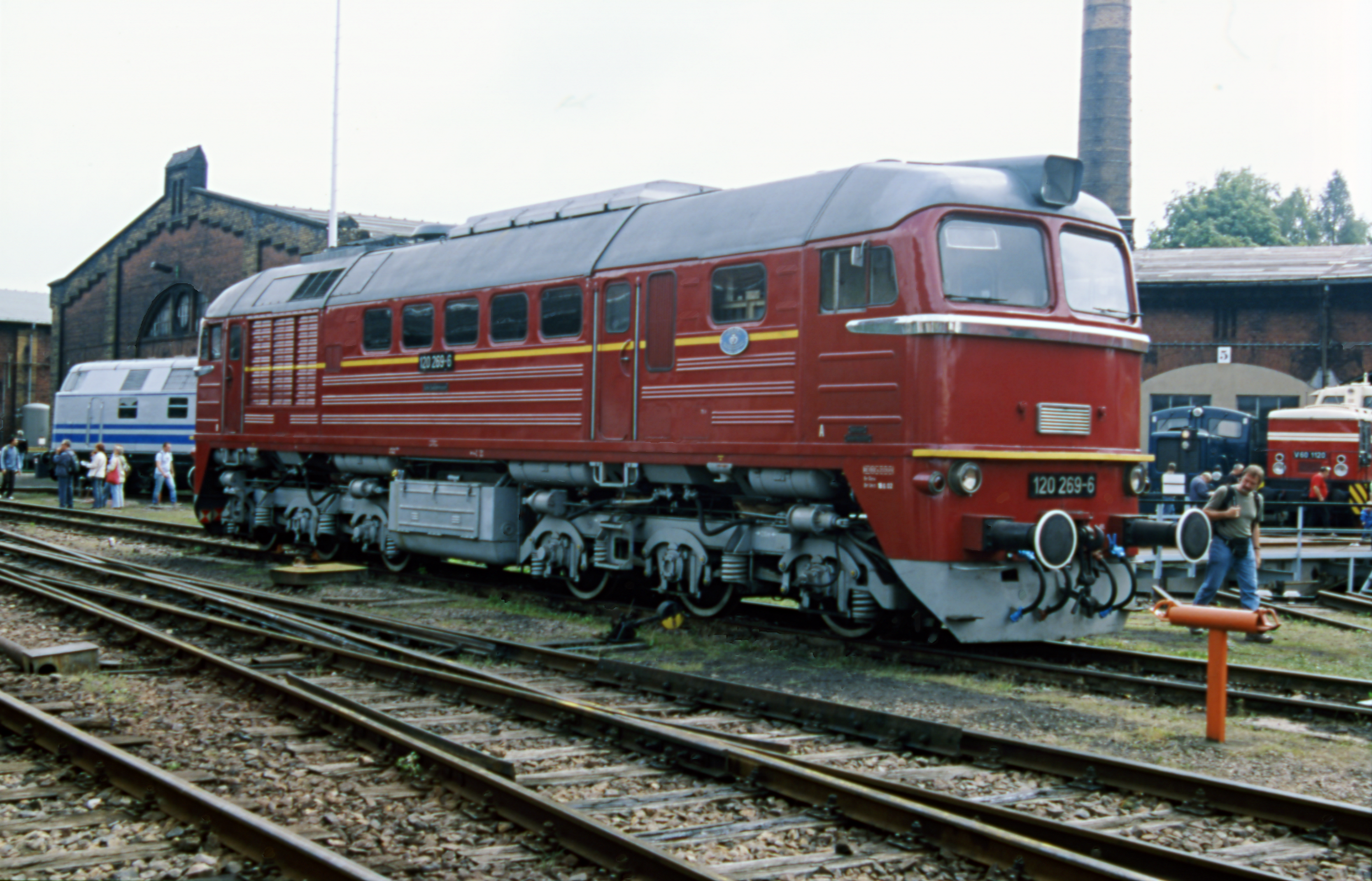 DR 120 269 Heizhausfest Chemnitz